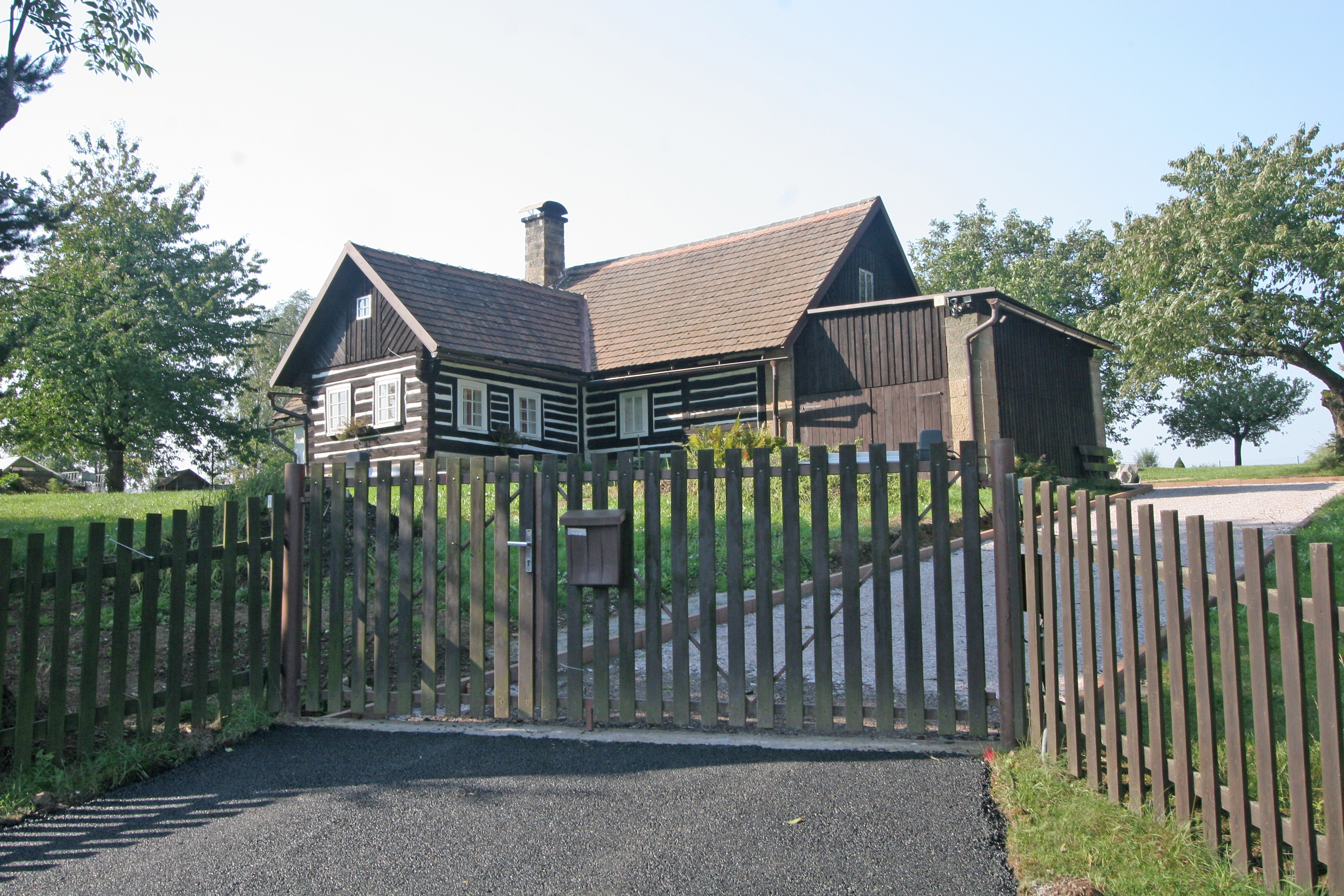 Bukovina čp. 47